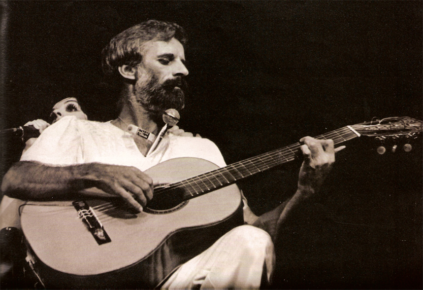 Português do Brasil: Luiz Henrique e Liza Minnelli, Rio de Janeiro, 1979.